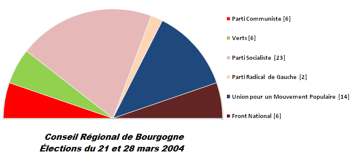 Composition du conseil régional de Bourgogne 2004-2010